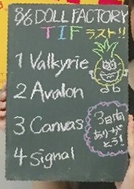 amiinAセトリボード(20170806(2))